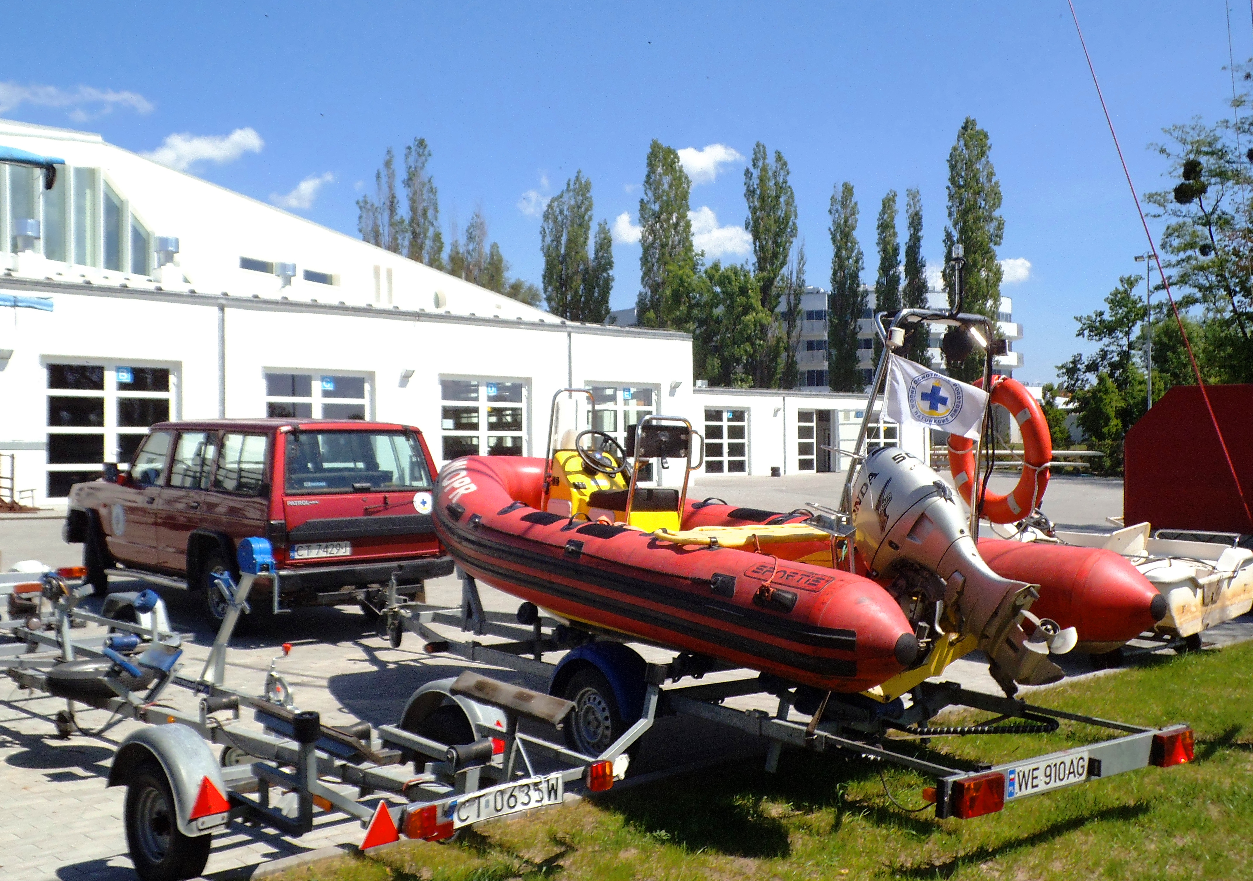 WOPR w Toruniu